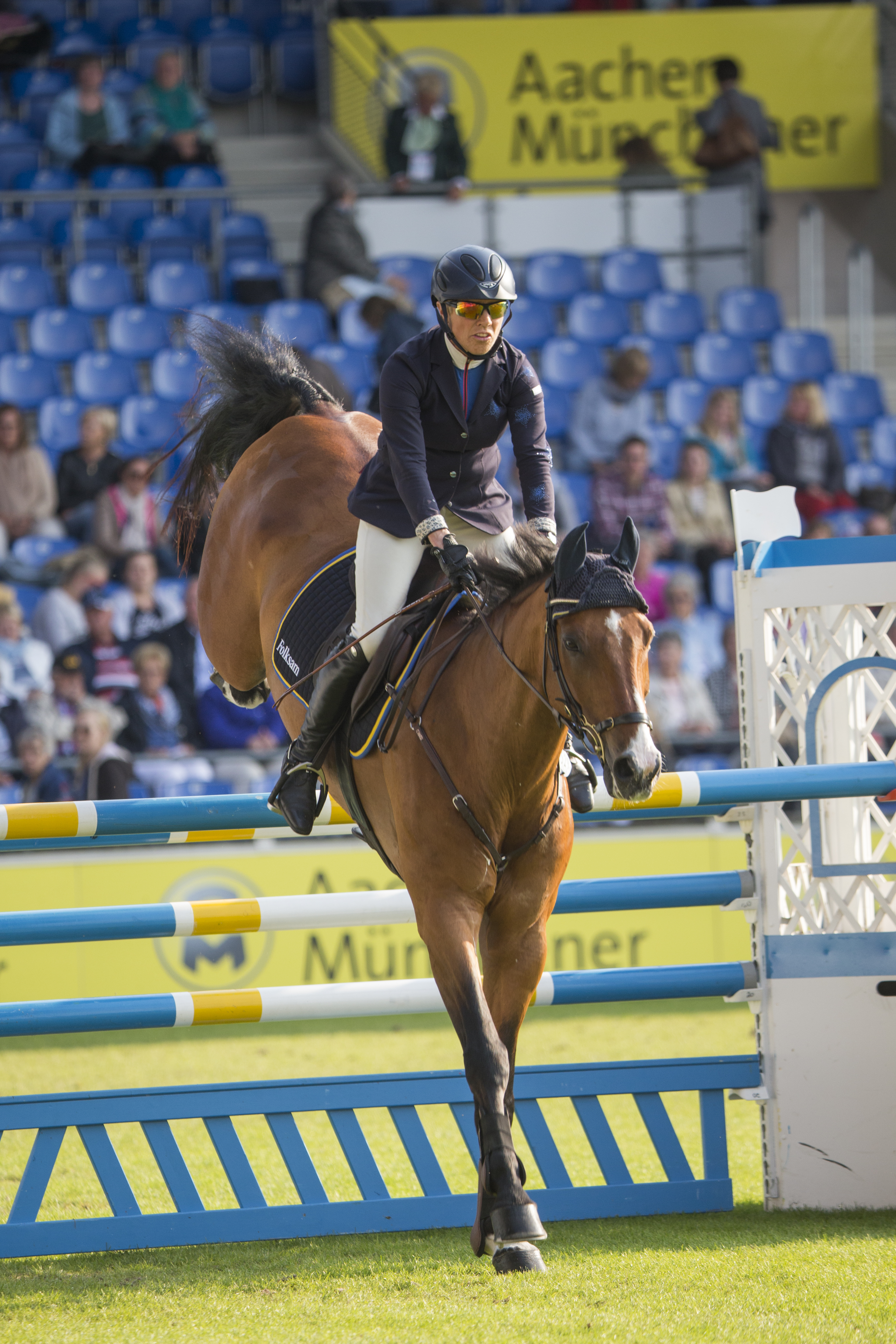 Aachen 160715 Anna Nilsson och Luron hade 4 fel i banhoppningen. Photo: Roland Thunholm Code: 718 35